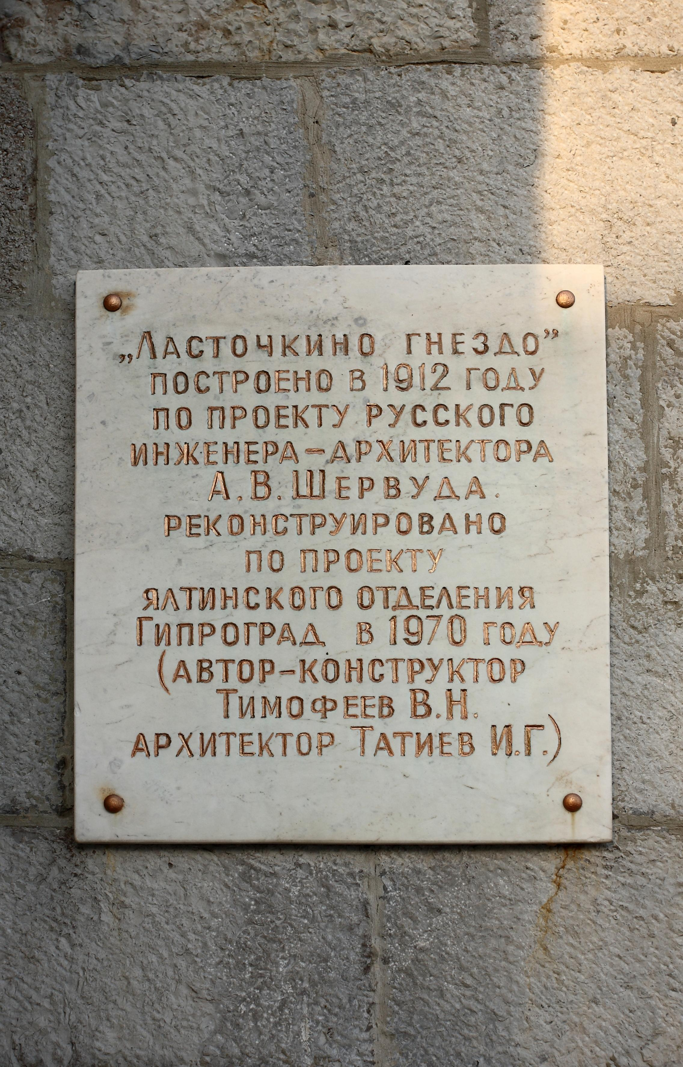 Гаспра вул. Алупкінське шосе, 9